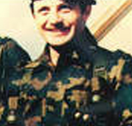 Teniente Primero Rubén Eduardo Márquez